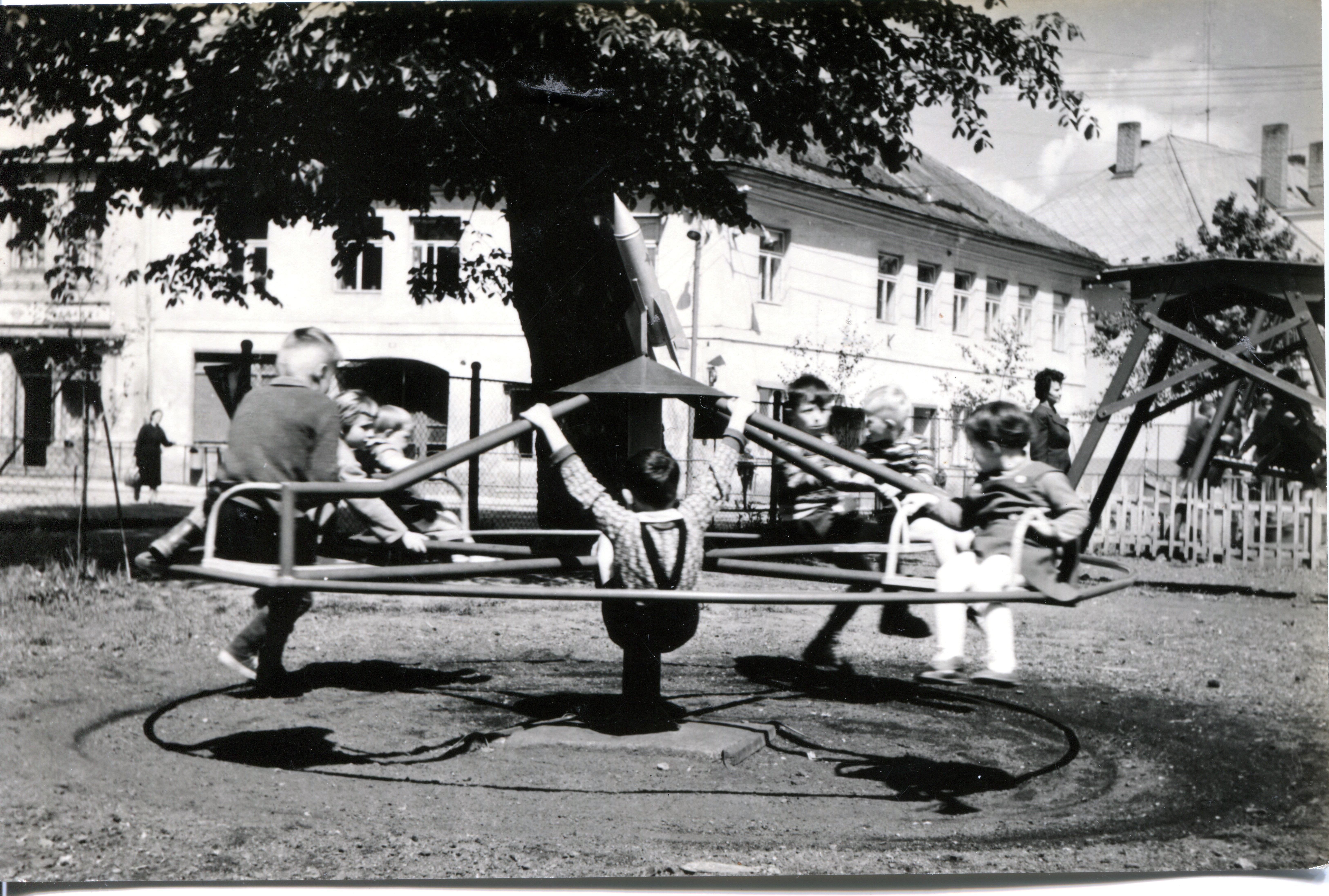 Volary, starý jilm u bývalého dětského hřiště.